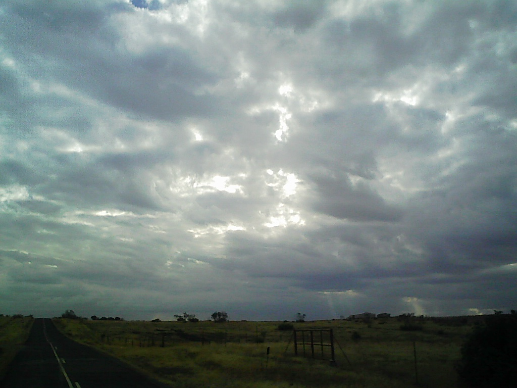 Nubes en Abenójar